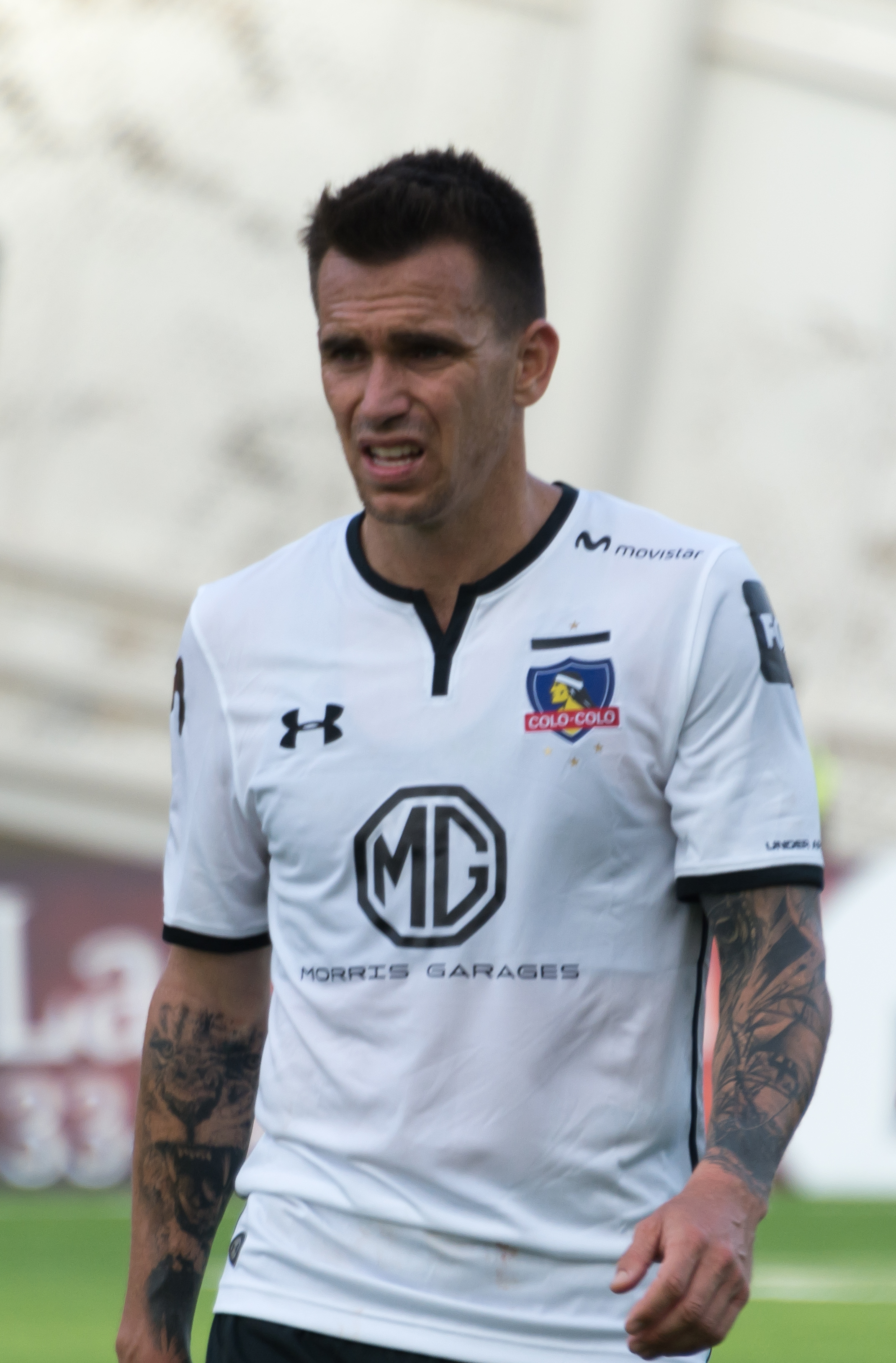 Pablo Mouche, Unión La Calera v Colo-Colo, Estadio Municipal Nicolás Chahúan Nazar, La Calera, Región de Valparaíso, Chile.